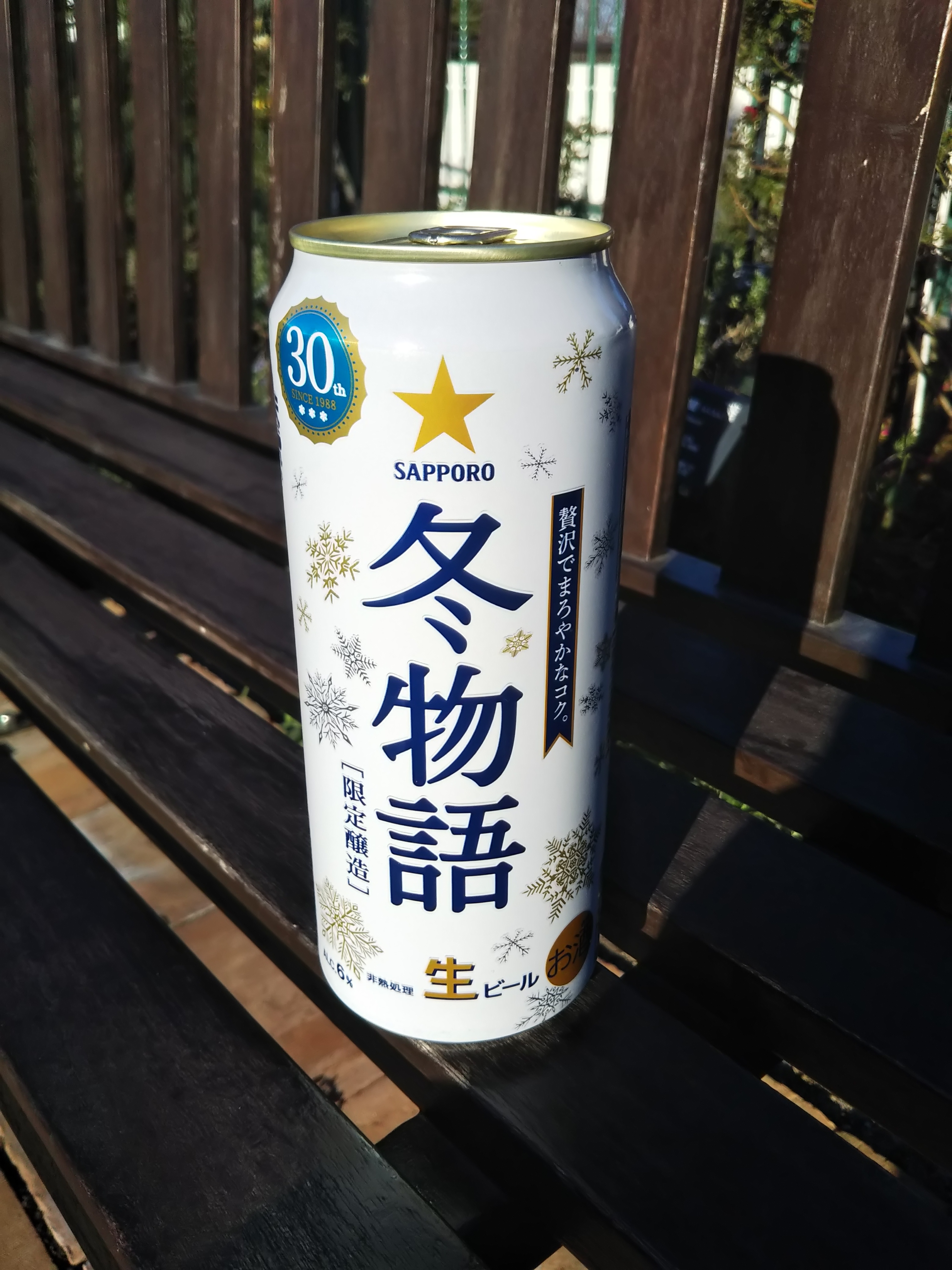 サッポロビールが製造販売するサッポロ冬物語 500ml缶。2018年発売の、30周年記念デザイン。